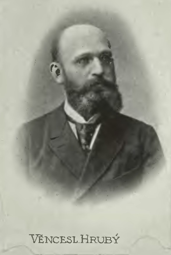 Portrét – Věnceslav Hrubý (1848-1933), Český právník, filolog, historik a politik.